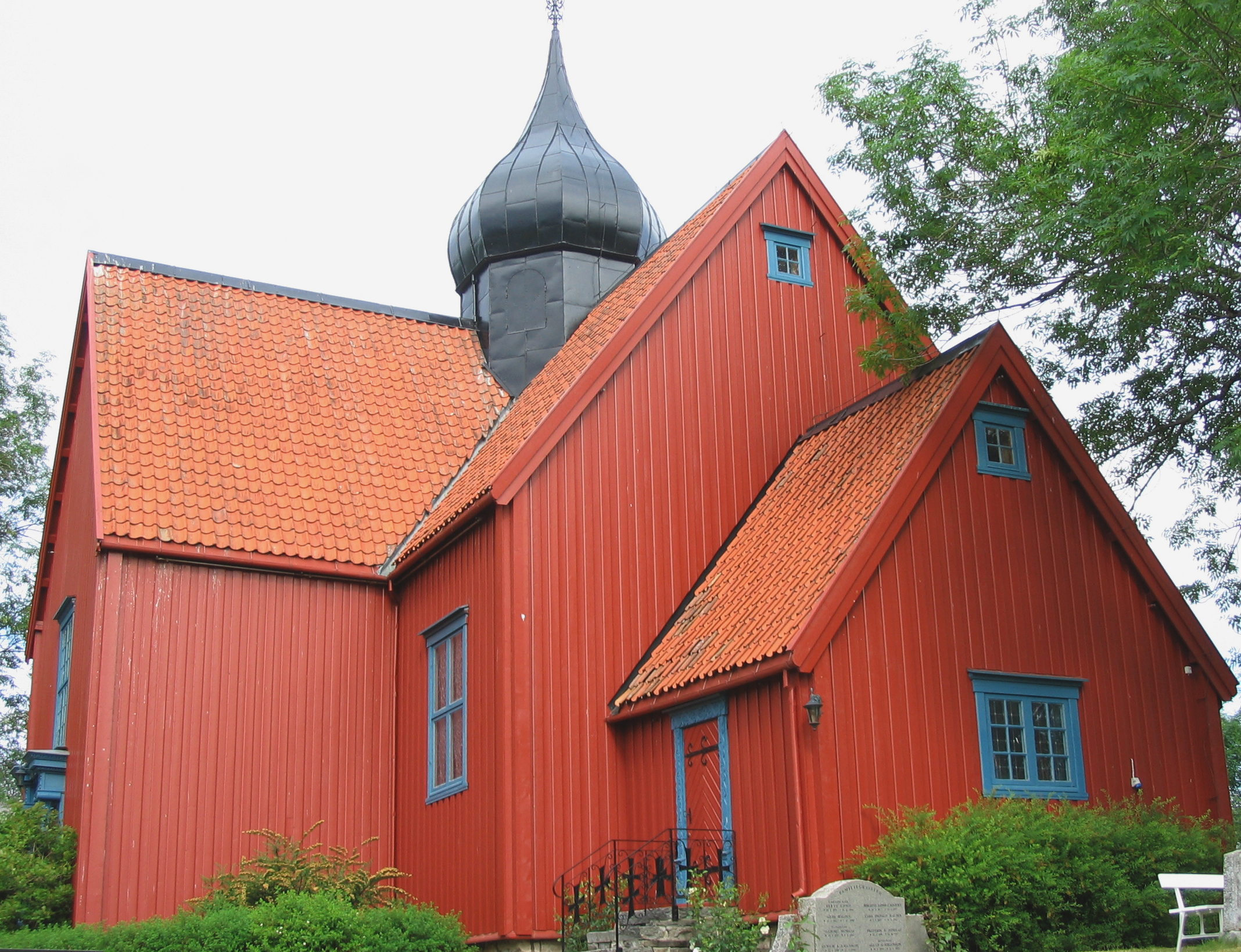 Rein Church in Rissa, Sør-Trøndelag, Norway